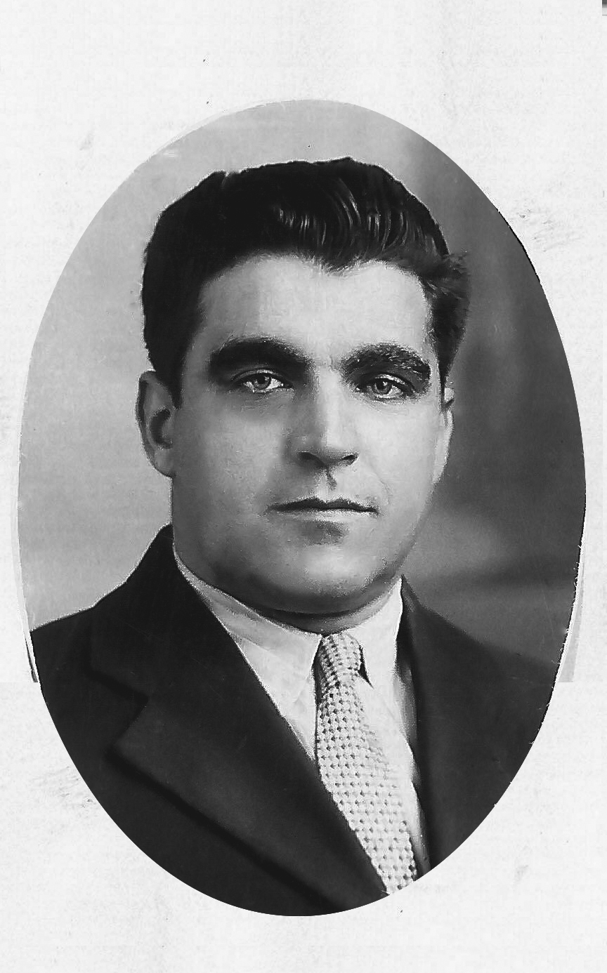 Don José Ramón Fernández Suárez, Socio y Fundador de Molino Harinero La Fama